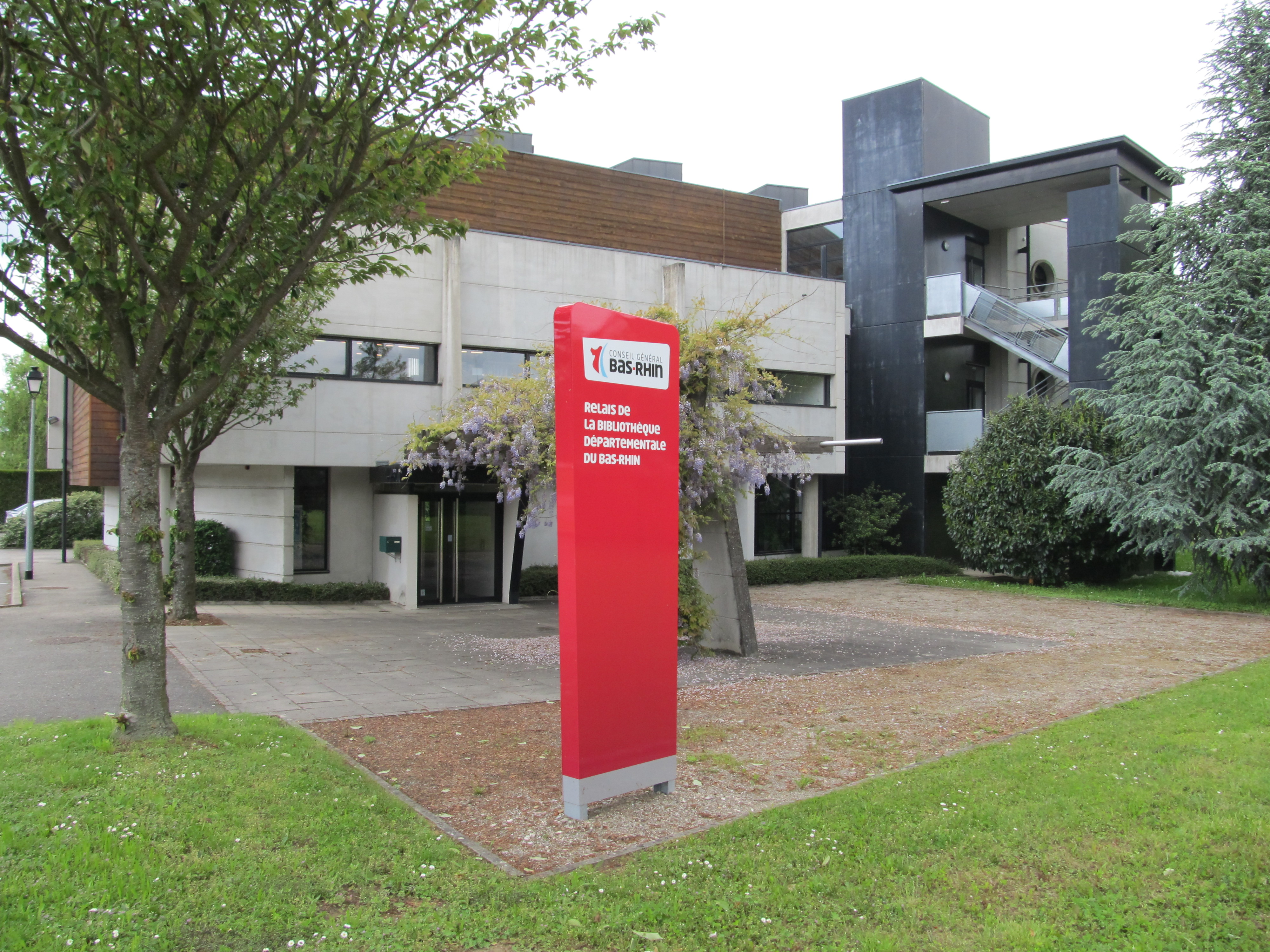 Bibliothèque de Betschdorf en 2013 - Relais BDBR